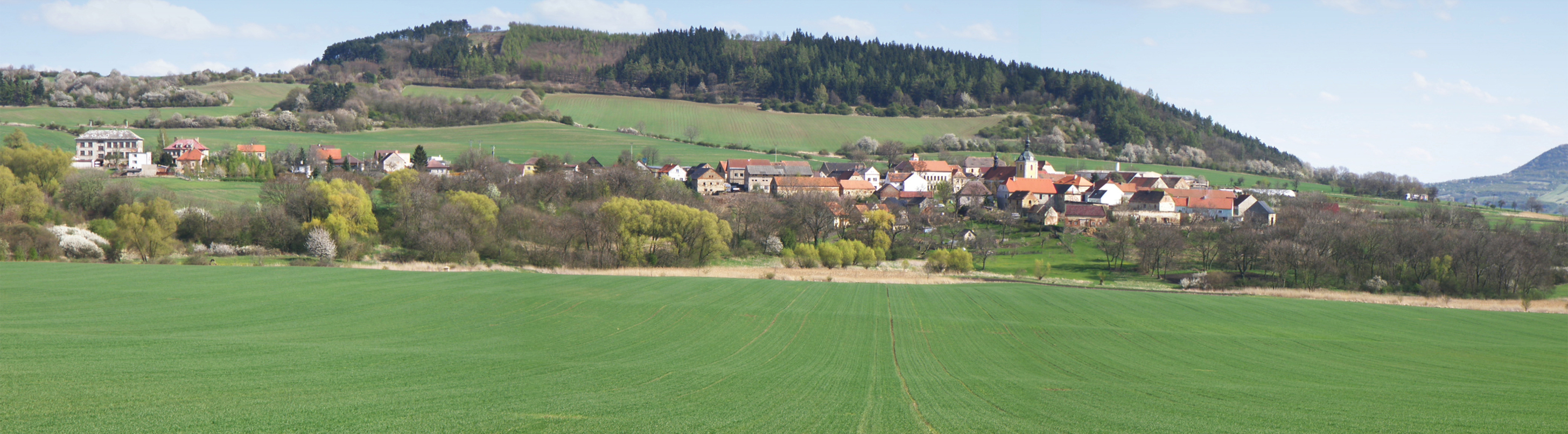 obec Kozly, okres Louny (fotografováno ze severního směru)